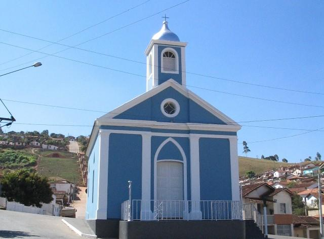 Capela de Nossa Senhora da Conceição Aparecida de Caconde. Imagem Arquivo Paroquial do Santuário Imaculada Conceição em Caconde.